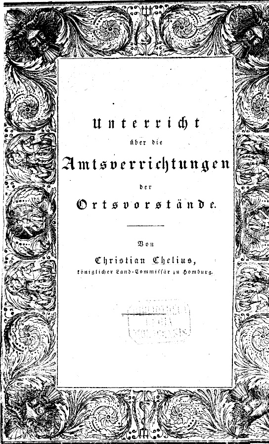 Johann Christian Chelius (1797-1870), Bayerischer Landtagsabgeordneter und Landkommissär (Bezirksamtmann), Titelblatt eines von ihm verfassten Buches, 1834